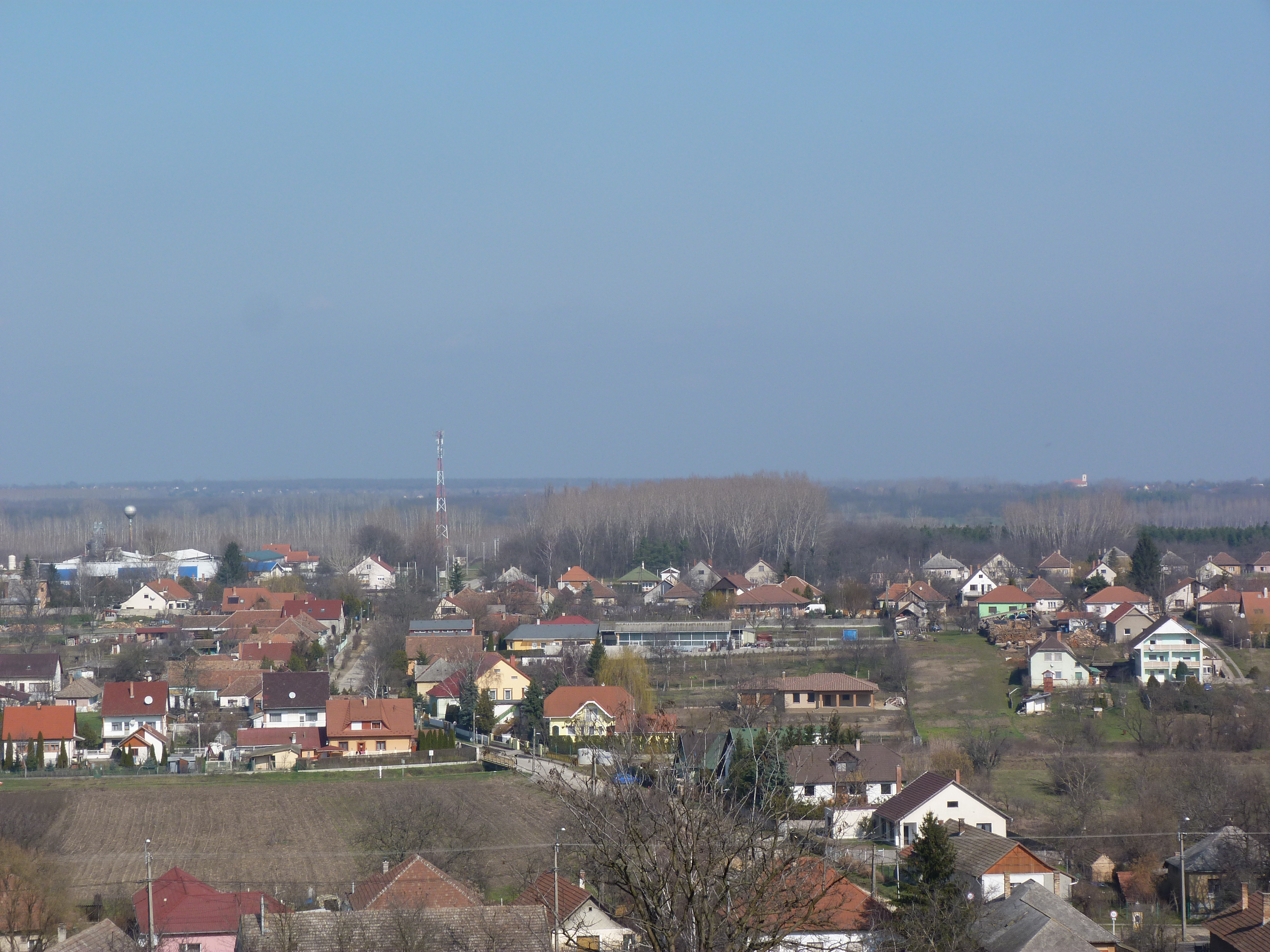 A felvétel 2014. február 26 -án készült Sülysápon. ©© Derzsi Elekes Andor, Budapest, 2014, You are authorised to use these photos and vids under Creative Commons – even for commercial, for profit purposes. Photos must be attributed to Derzsi Elekes Andor. All of the photos and vids in the Metapolisz DVD line are under Creative Commons and can be used even for commercial – for profit – purposes. Recommended Citation Derzsi Elekes Andor: Metapolisz DVD line